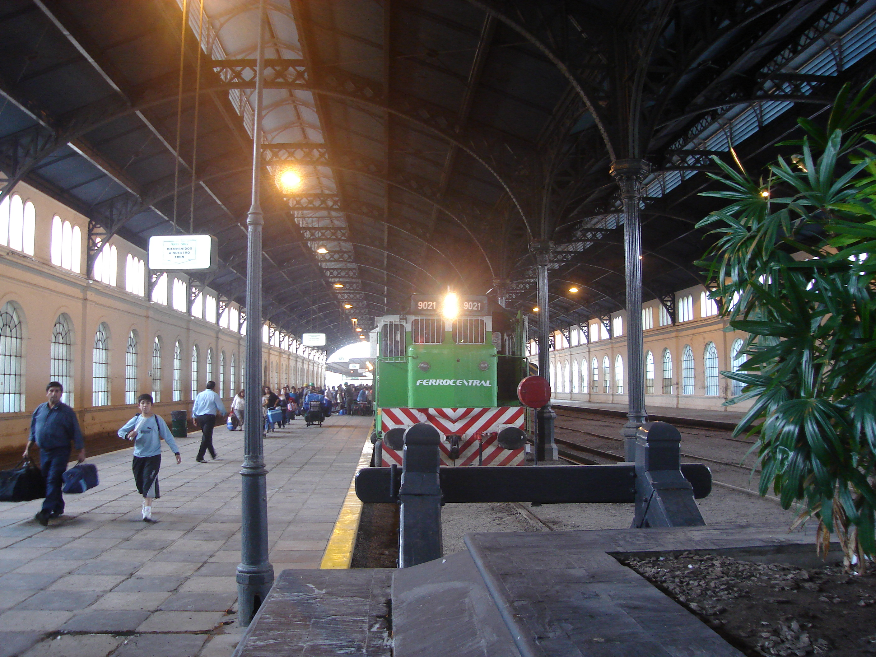 Estación F.C.N. Gral B. Mitre (Sunchales)